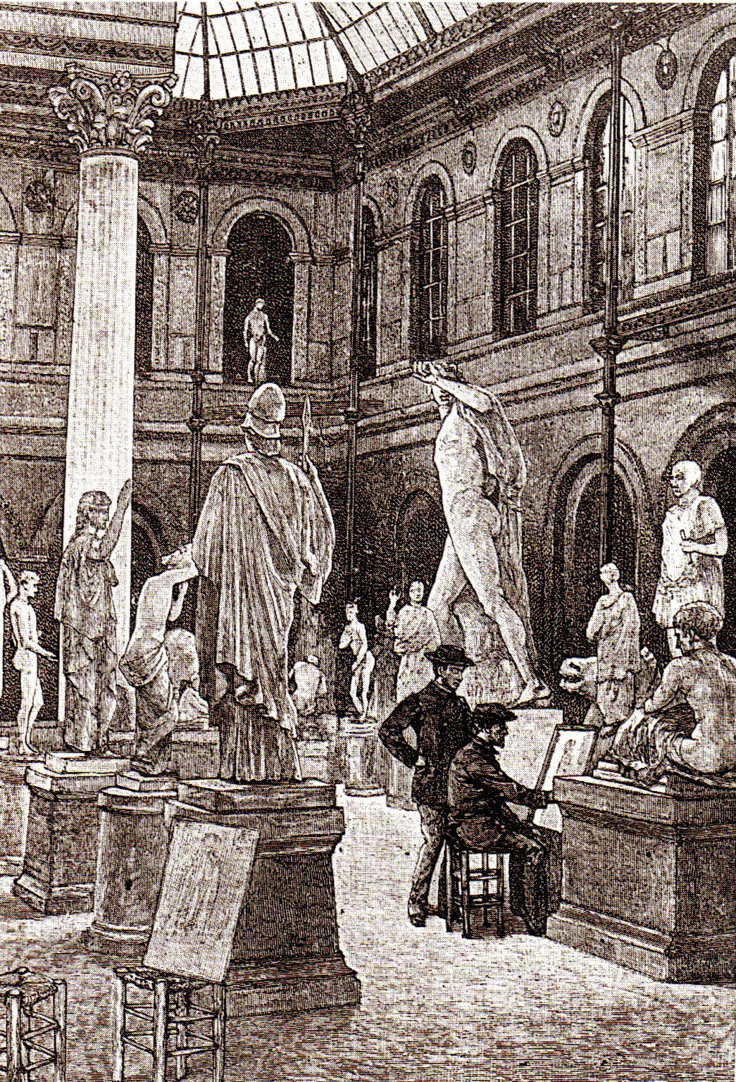 Palais des Etudes - Cour vitrée et musée en 1888